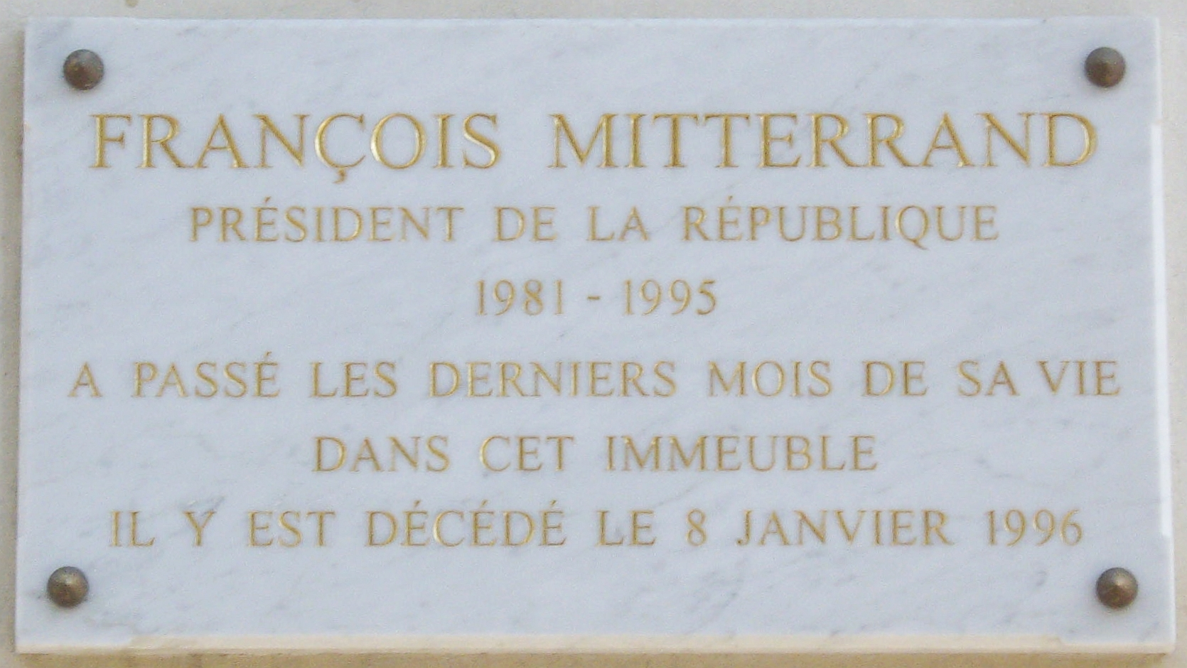 Plaque commémorative, 9 avenue Frédéric-Le-Play, Paris 7e. « François Mitterrand, président de la République 1981-1994, a passé les derniers mois de sa vie dans cet immeuble. Il y est décédé le 8 janvier 1996. »